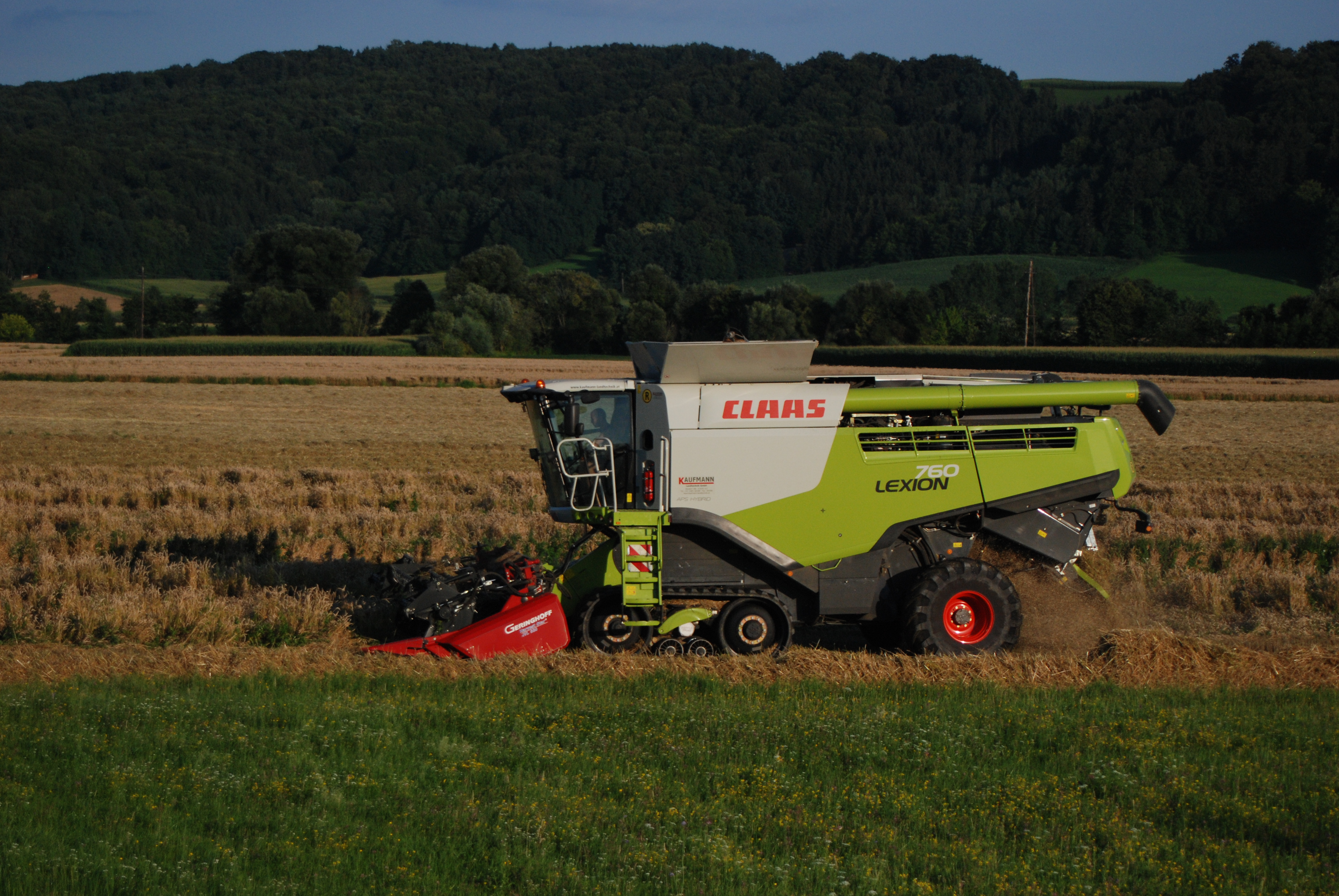 Claas Lexion 760 Mähdrescher